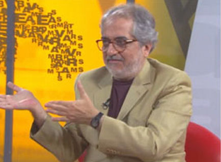 O jornalista brasileiro Geneton Moraes Neto